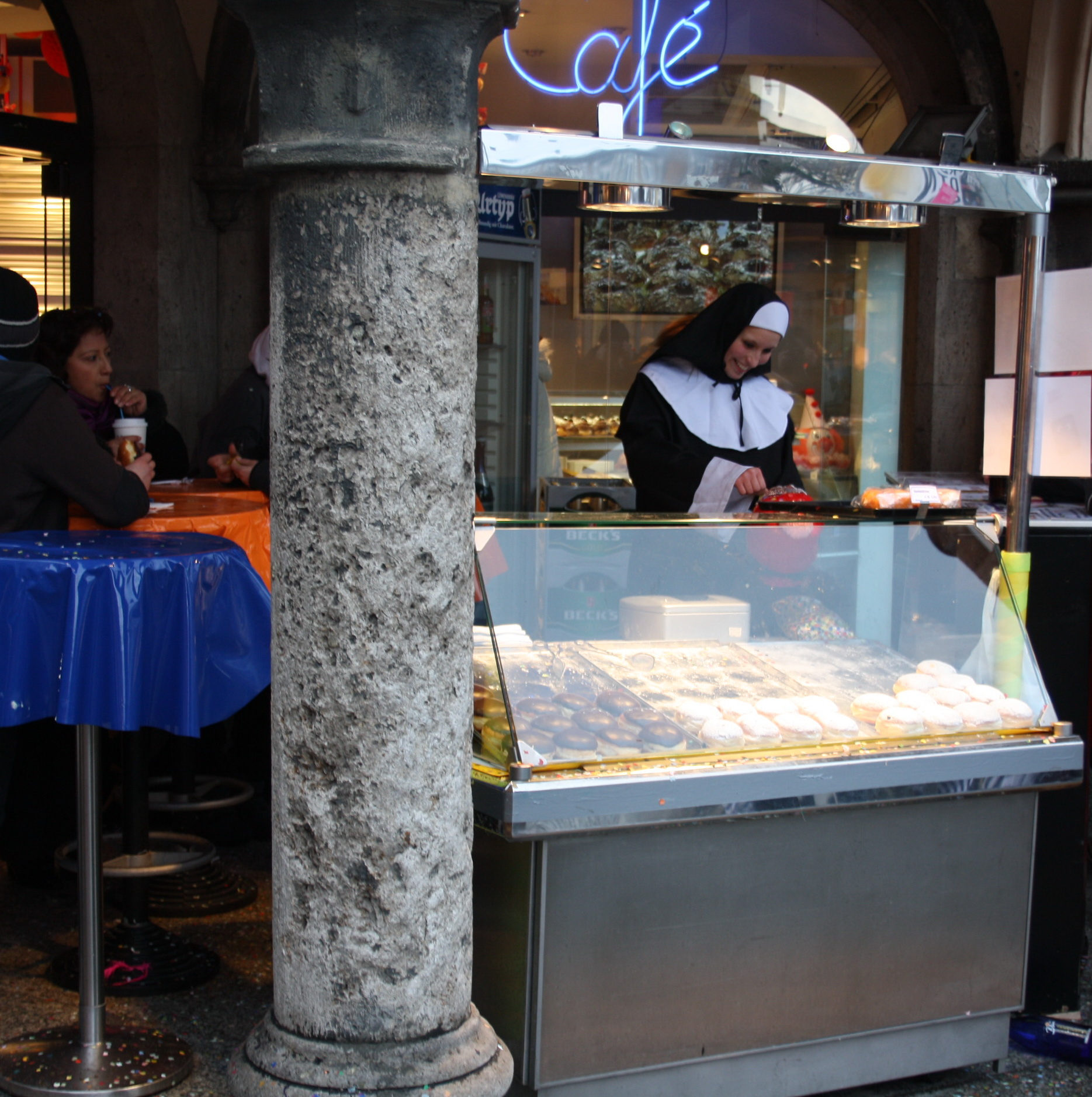 Krapfenstand am Münchner Viktualienmarkt am Faschings-Dienstag.